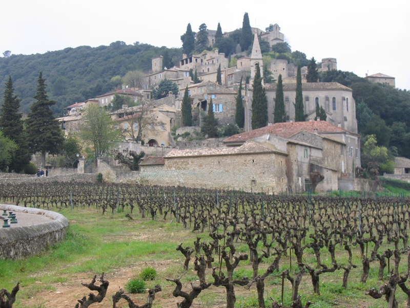 La Roque-sur-Ceze